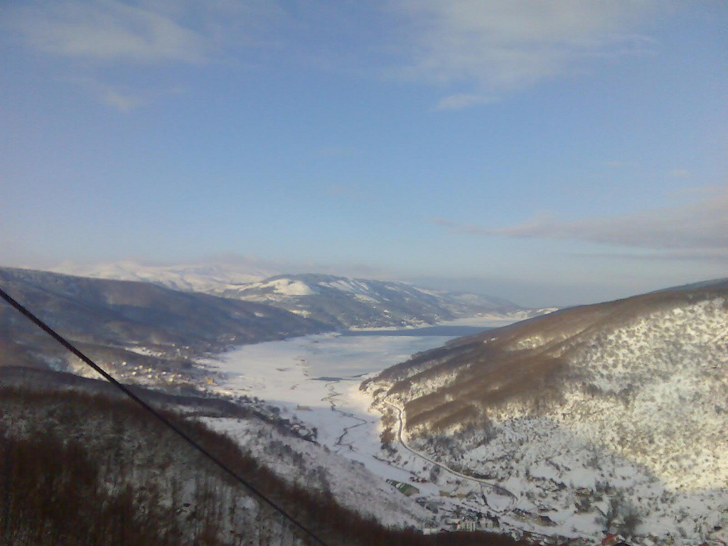 Мавровското езеро през зимата